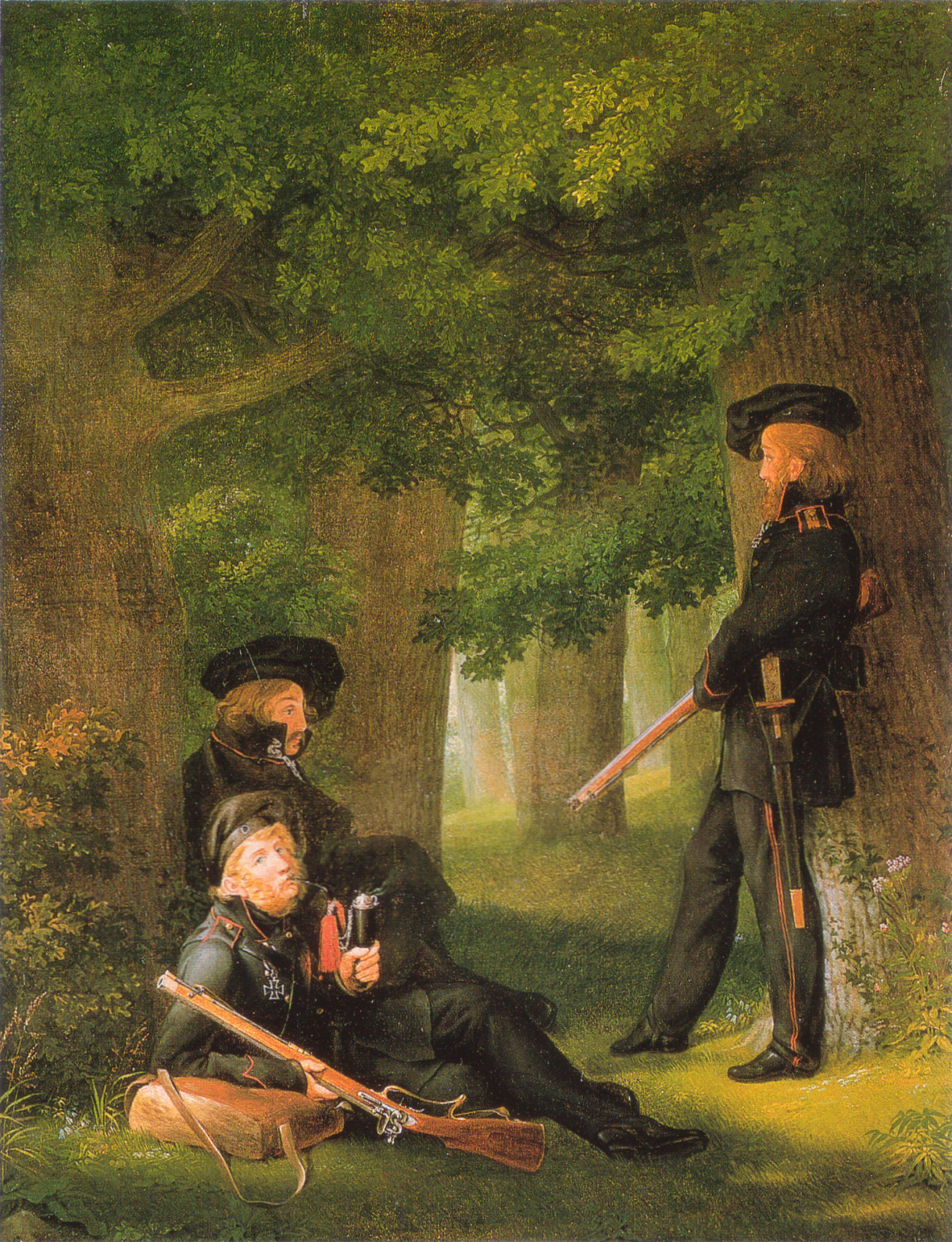 Theodor Körner, Karl Friedrich Friesen and Henry Hartmann as „Lützower Jäger“ (literally Lützow hunters).